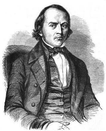 "Portrait de M. Vivien."